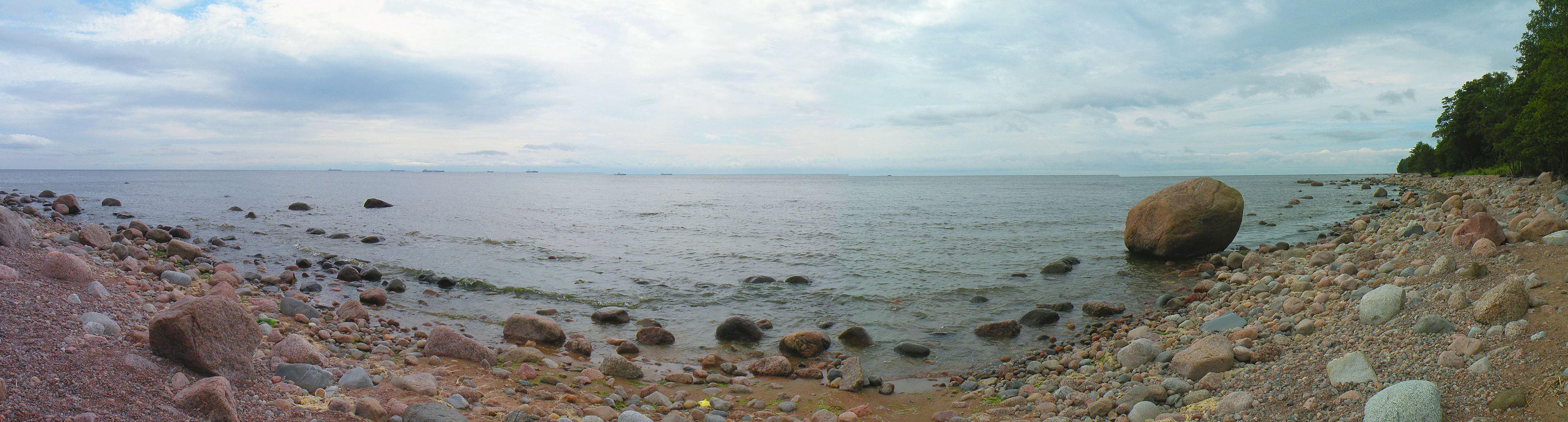 Финский залив и суда, идущие Северным фарватером.